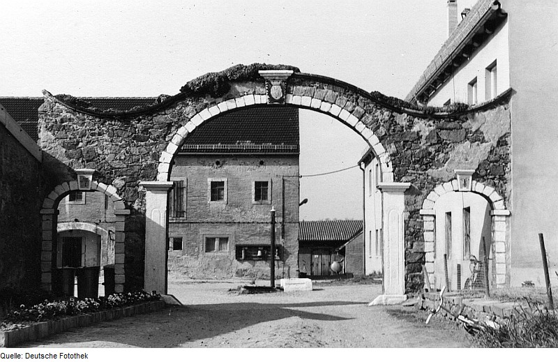 Original image description from the Deutsche FotothekTriebischtal-Roitzschen. Torananlage eines Gutshofes neben der Korkmühle